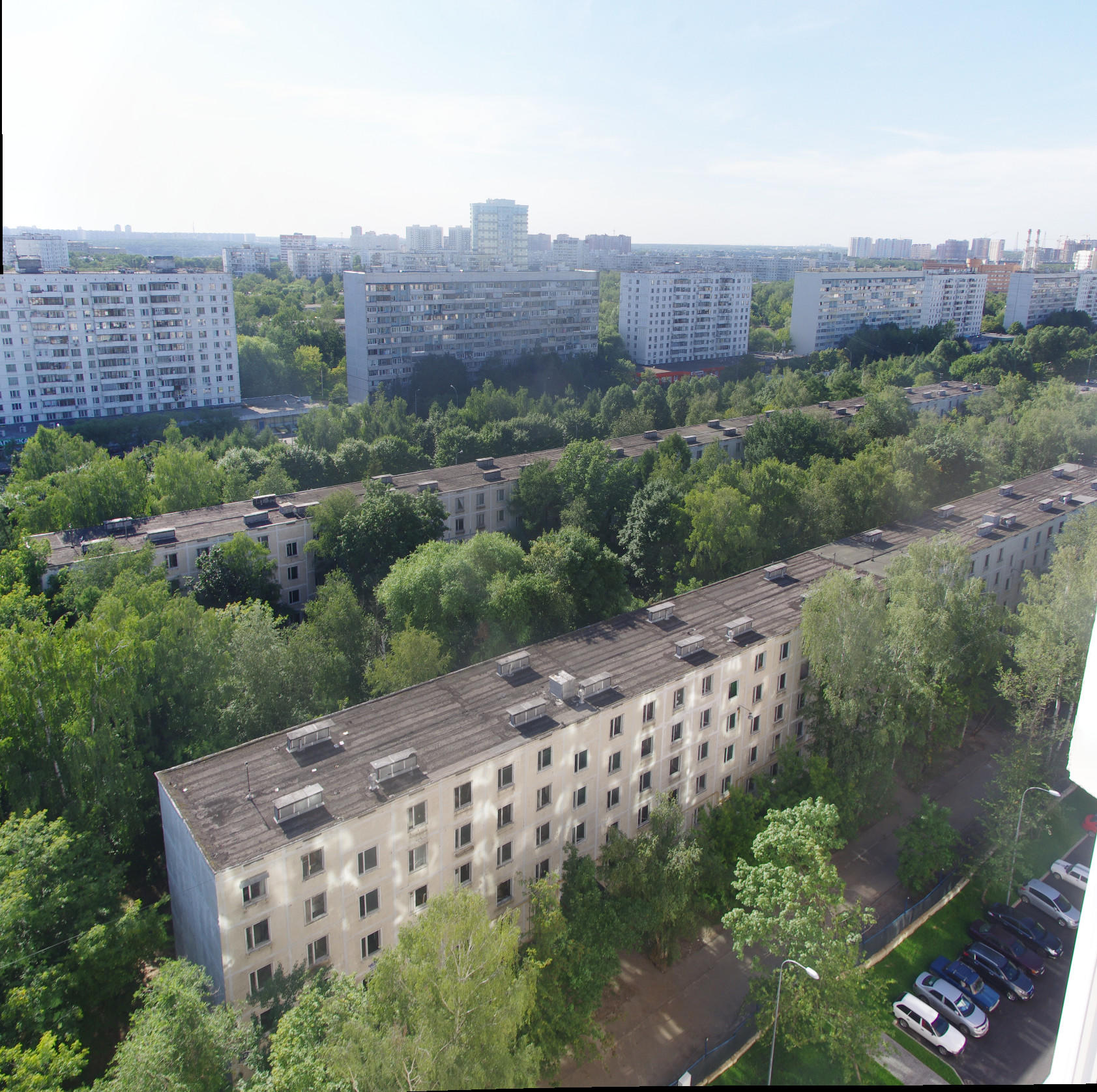 Москва, пятиэтажки на Туристской улице перед сносом